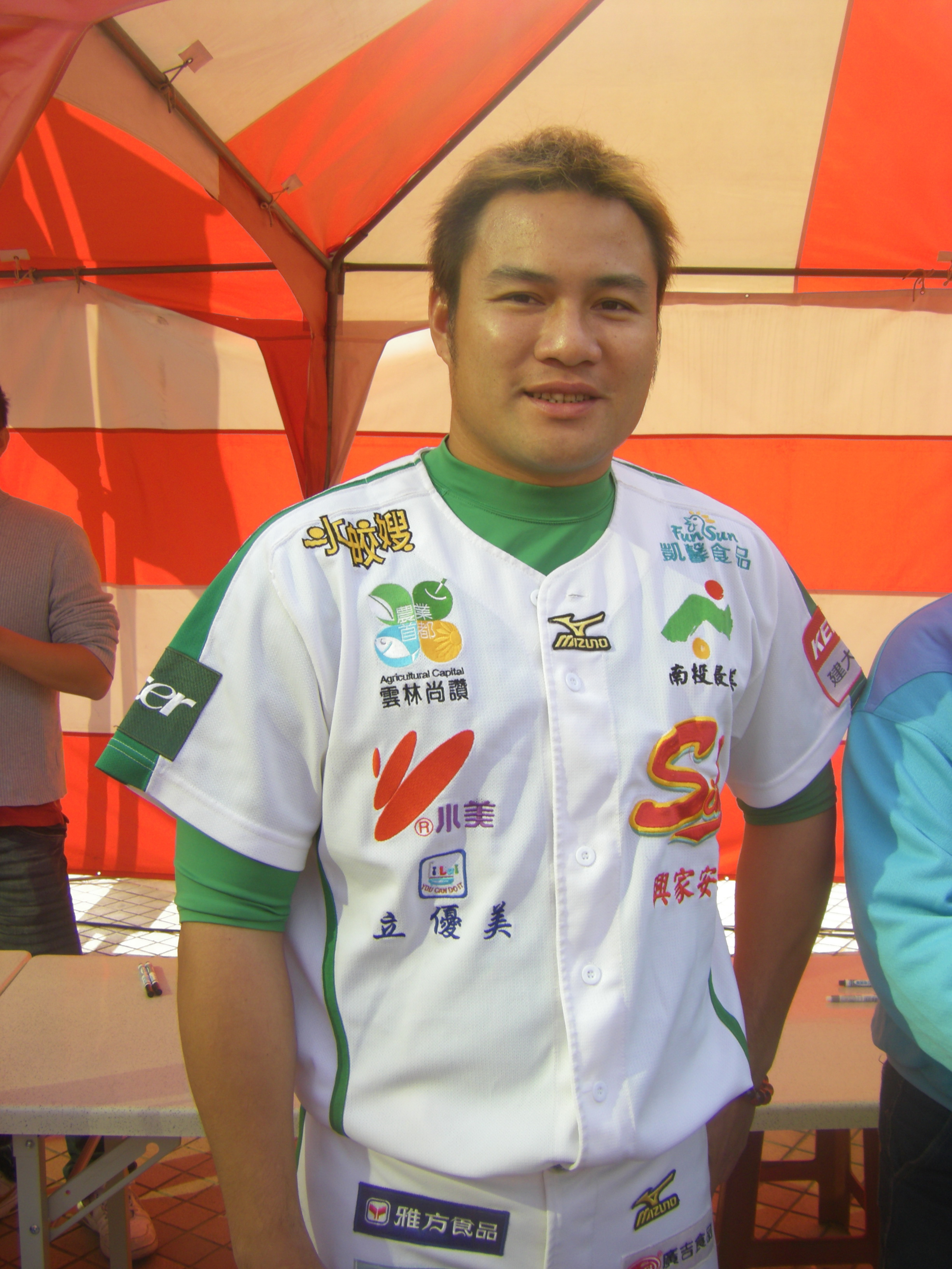 中文（台灣）: 鄭達鴻參加2011『打造運動島 一起玩棒球!』棒球嘉年華活動